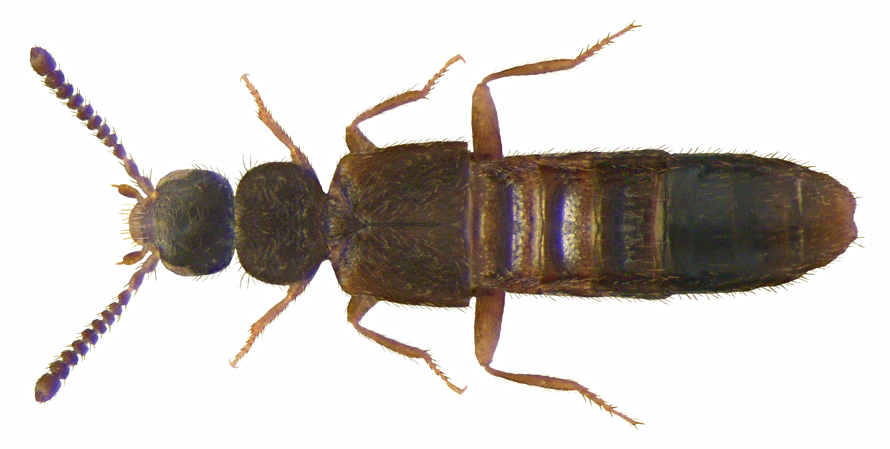 Familie: Staphylinidae Groesse: 1,7-1,9 mm Verbreitung: Europa Ökologie: an Faulstoffen Fundort: Germania, Bayern, Oberfranken, Selbitz leg.det. U.Schmidt, 1982 Photo: U.Schmidt, 2009